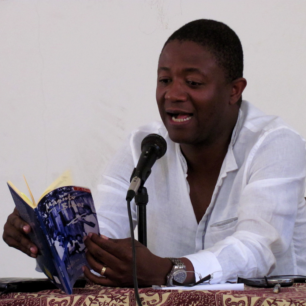 Retrato de Nelson Saúte, a ler um poema do seu livro Maputo Blues. Fotografia tirada a 2011/09/01 em São Tomé.